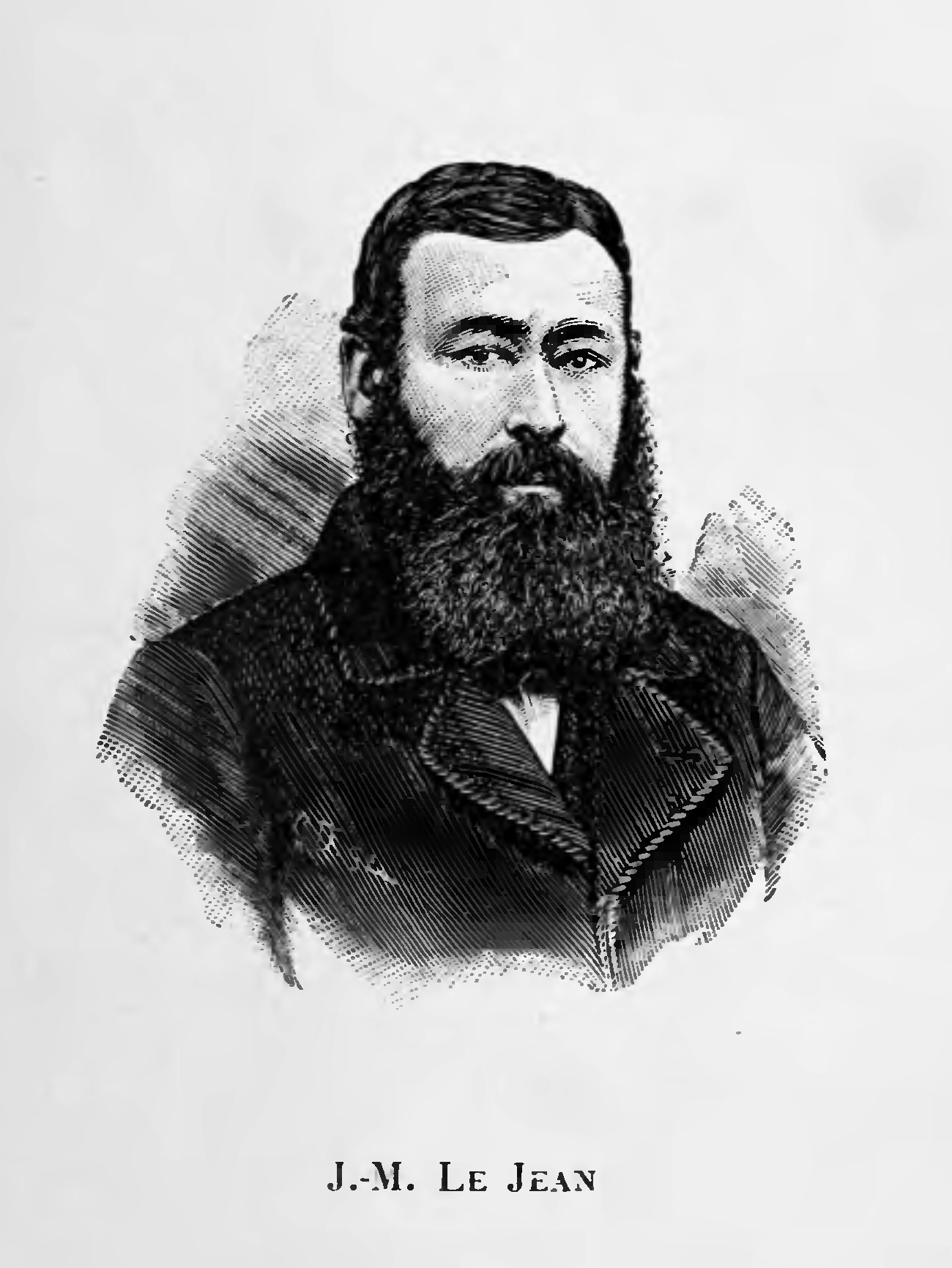 Portrait gravé de J.-M. Je Jean, en page 65 de Joseph Rousse, La poésie bretonne au XIXe siècle, Lethielleux Paris 1895.